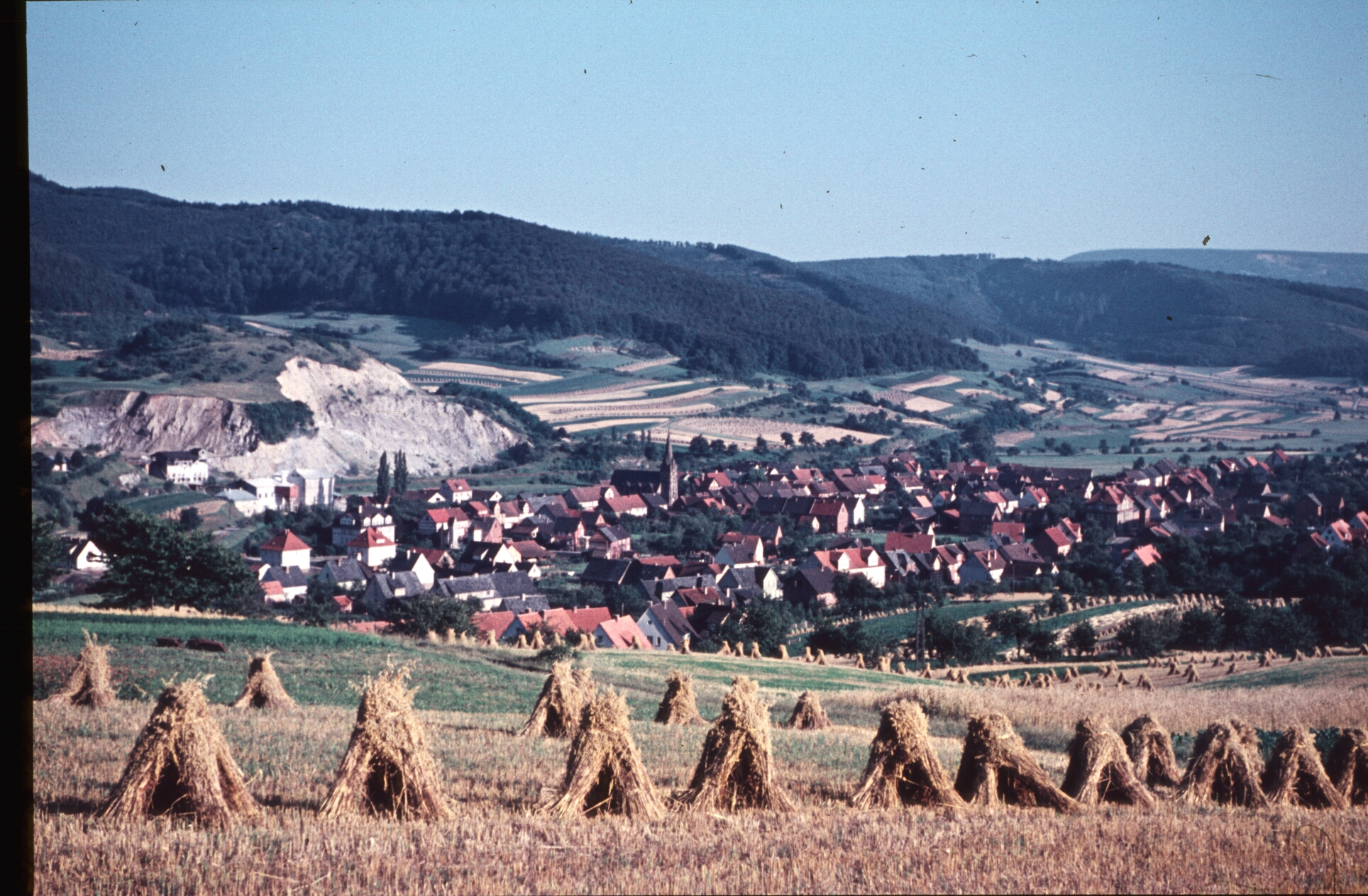 Blick von der Spitze auf Hundelshausen im Sommer 1957 - Scan eines Diabildes